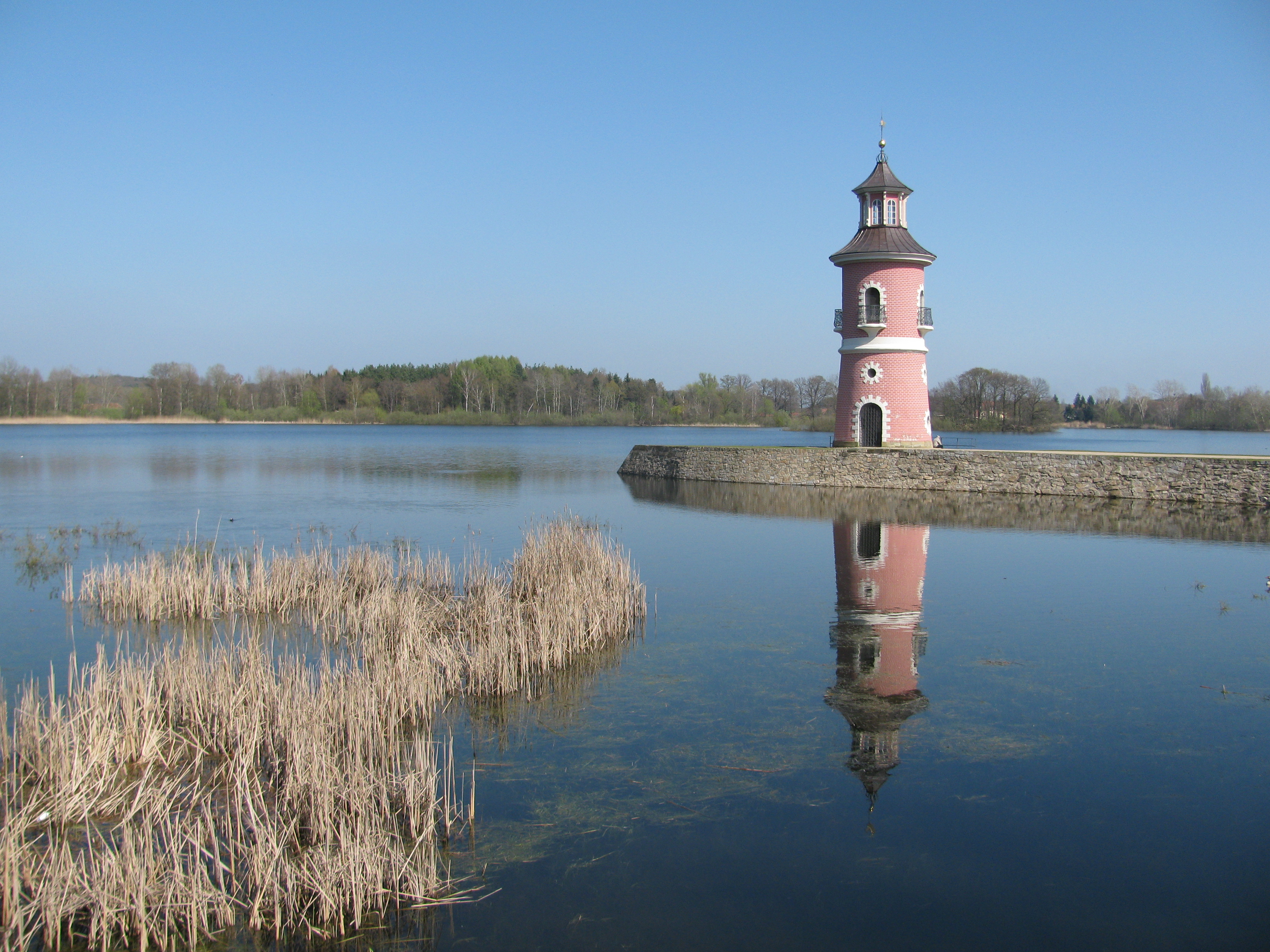 Leuchtturm Moritzburg, Sachsen, am Niederen Großteich bei Bärnsdorf